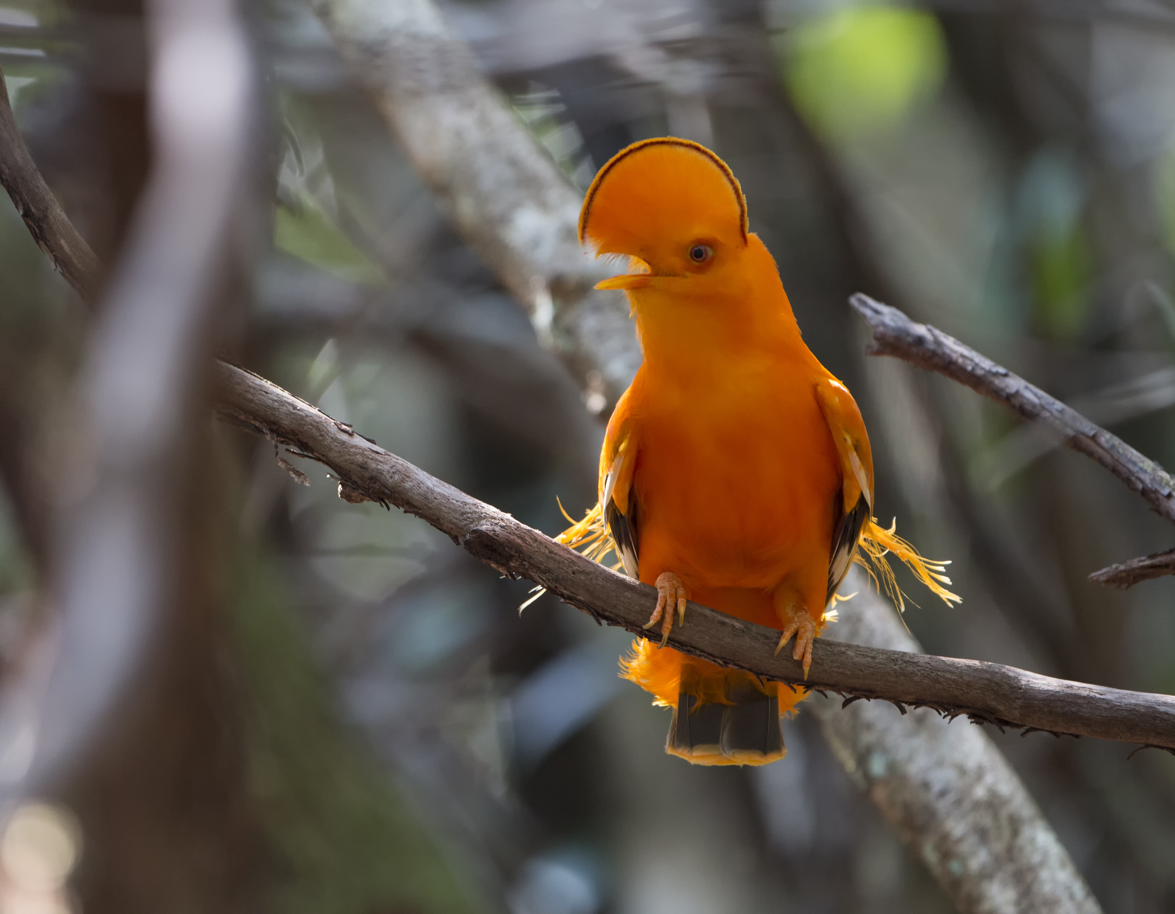 Ave fotografada em Presidente Figueiredo-AM